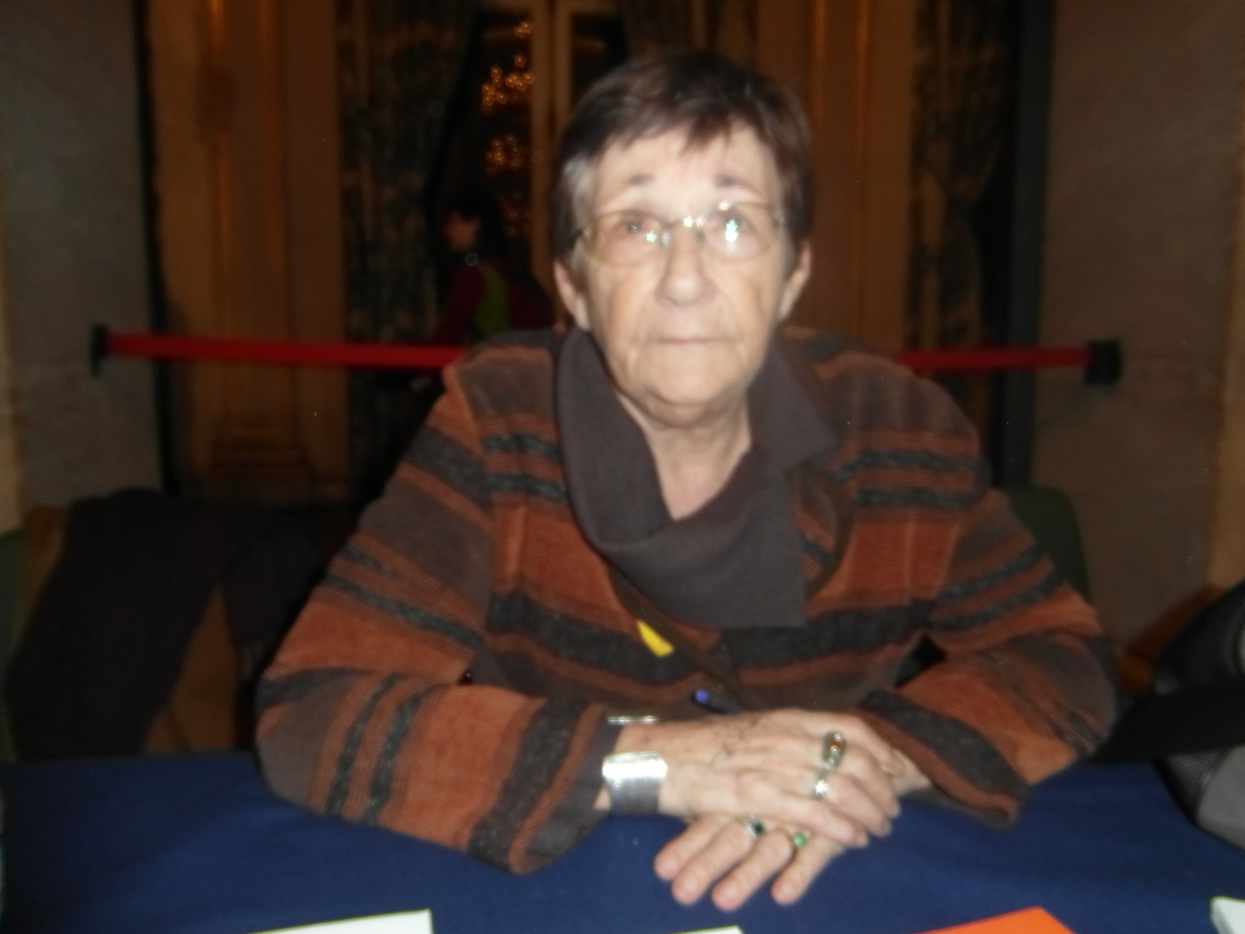 20e Maghreb des Livres, Paris, 8 février 2014